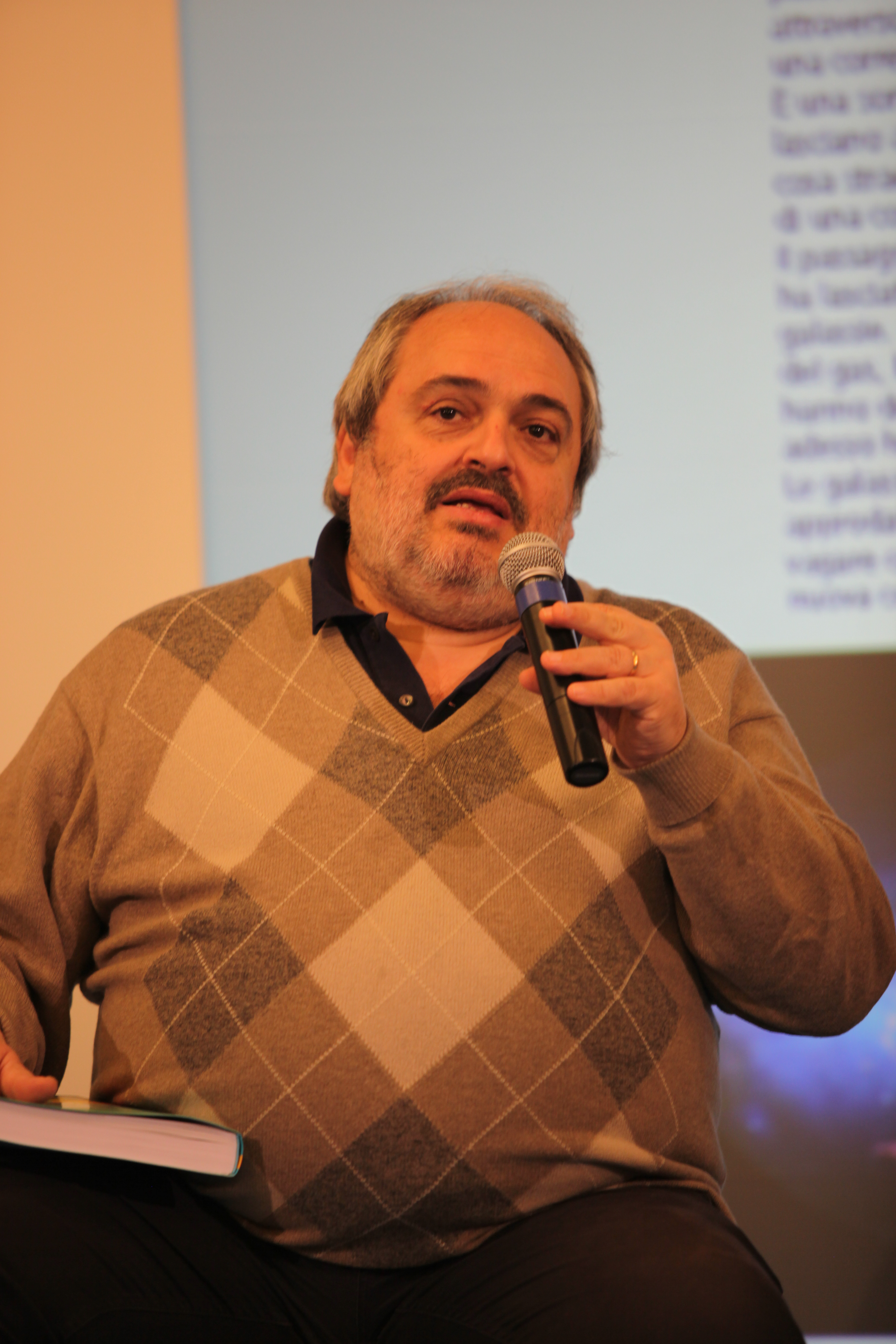 Luca Doninelli, Golosaria, Milano, 2011